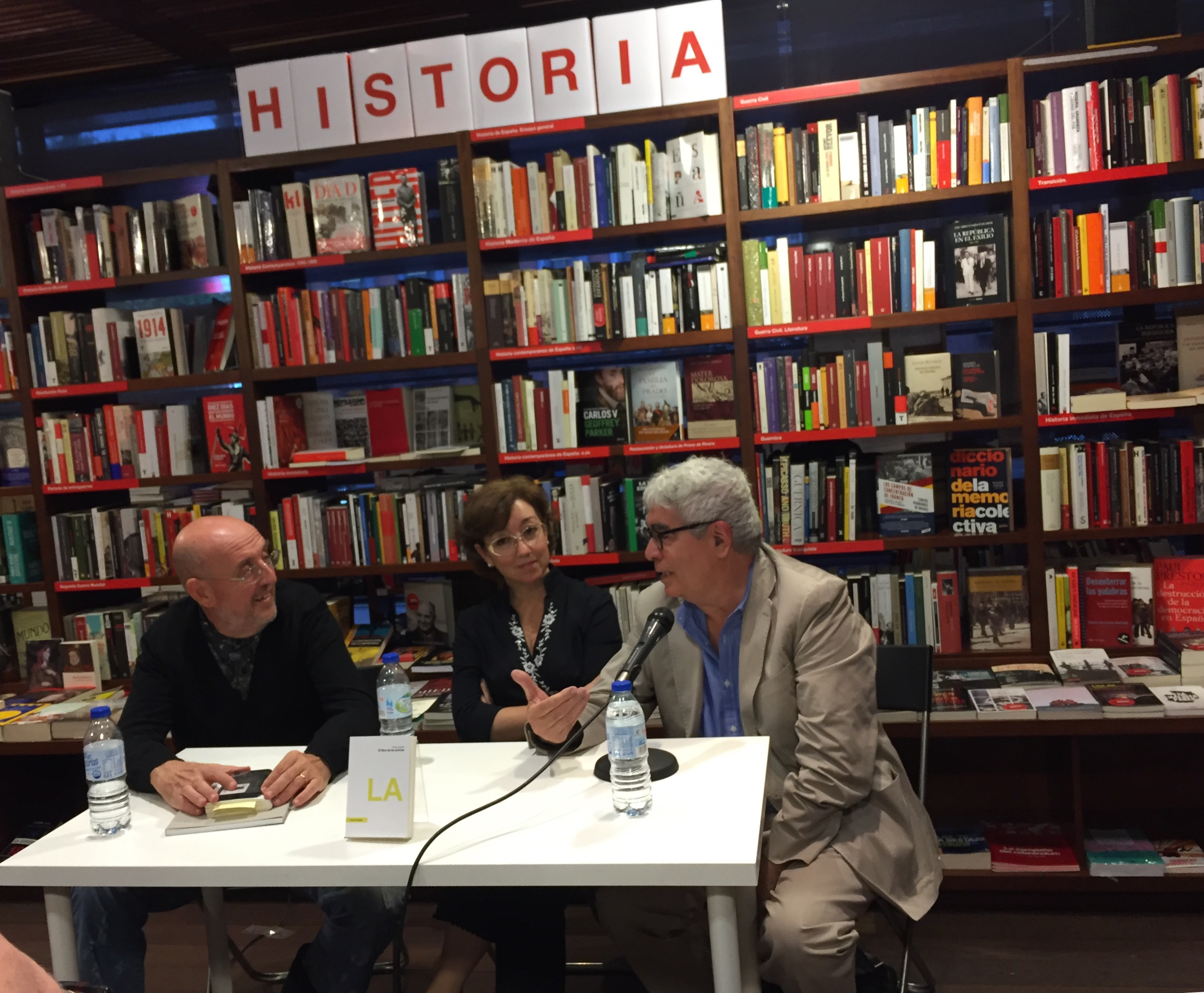 en la librería La Central del Museo Reina Sofía, con Fernando Castro y Marta Perez Ibáñez